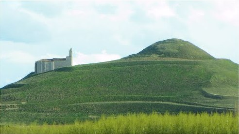 Vistas de la Ermita de Muñó y montículo donde se ubicaba el Castillo de Muñó